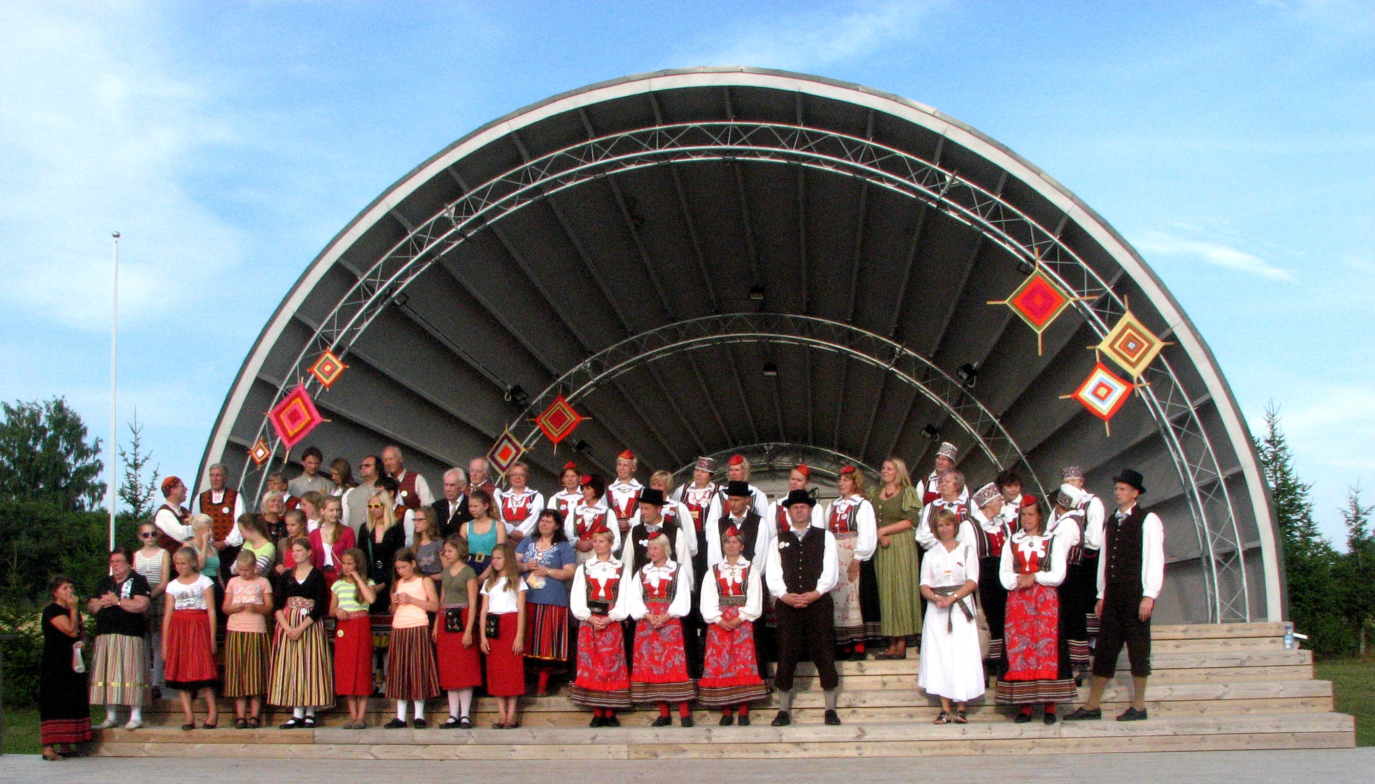 Jööri folgi kõik esinejad laval